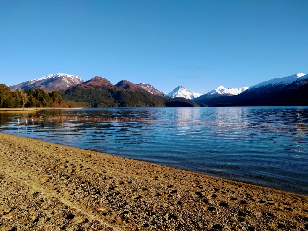 vista del lago mascardi, con orientación al cerro tronador